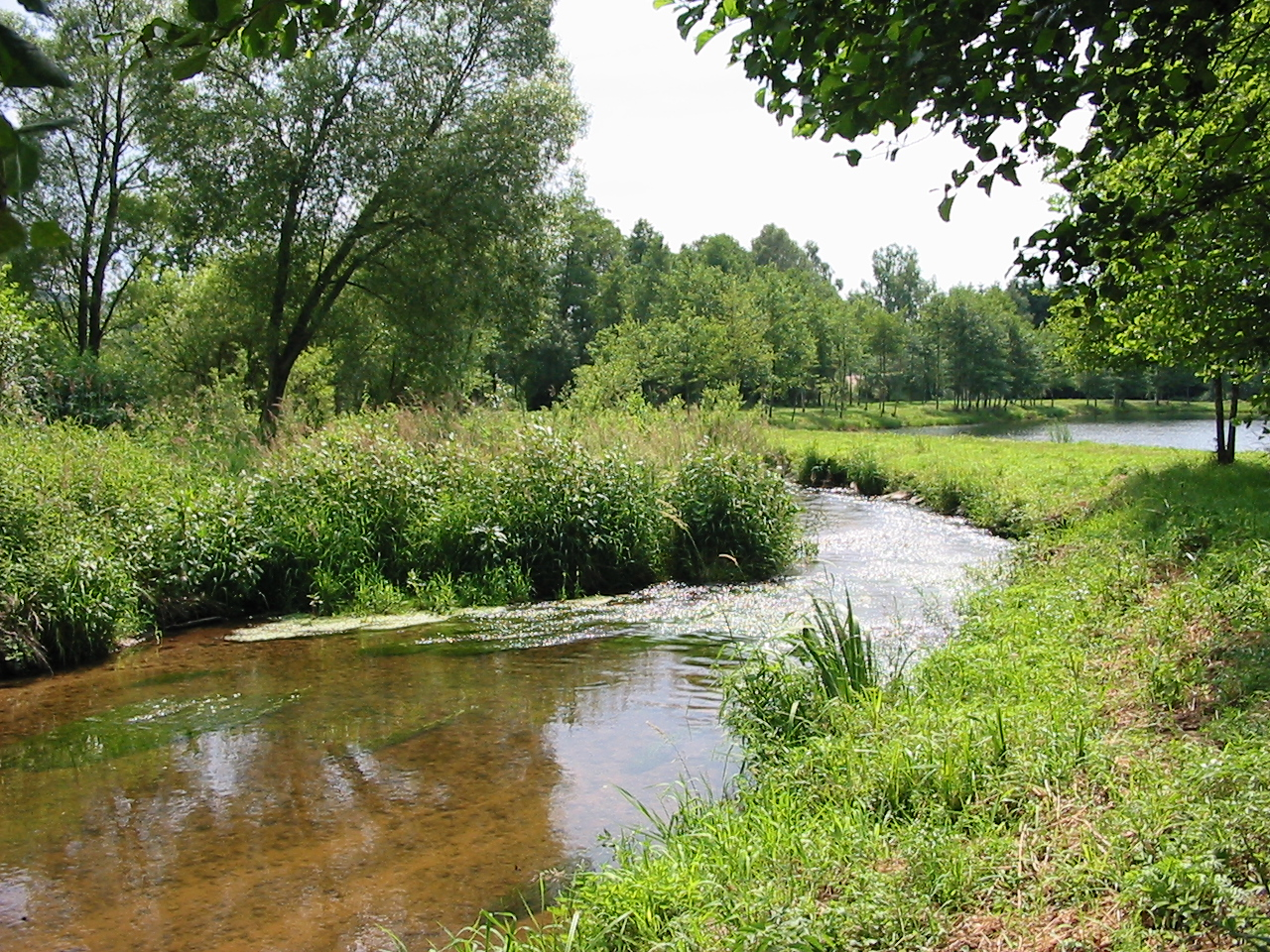 Le Neuné, rivière des Vosges, à La Chapelle-devant-Bruyères.